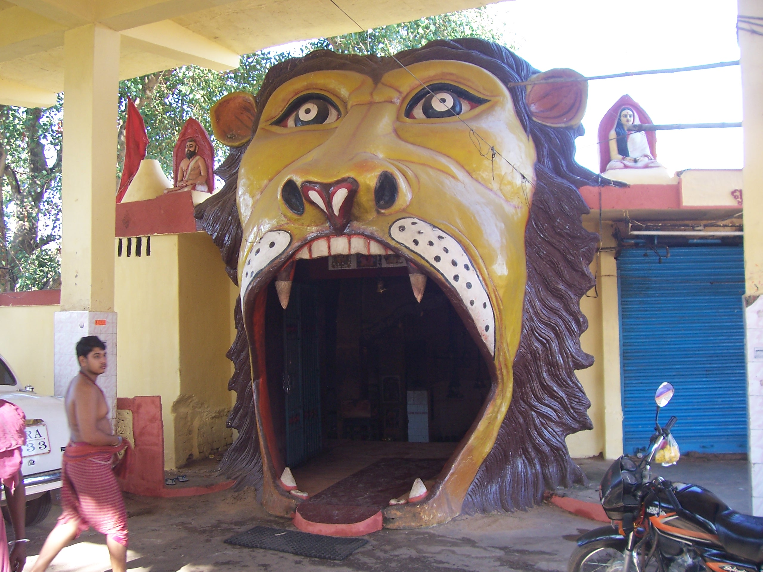 Smasan Kali Temple, Cuttack